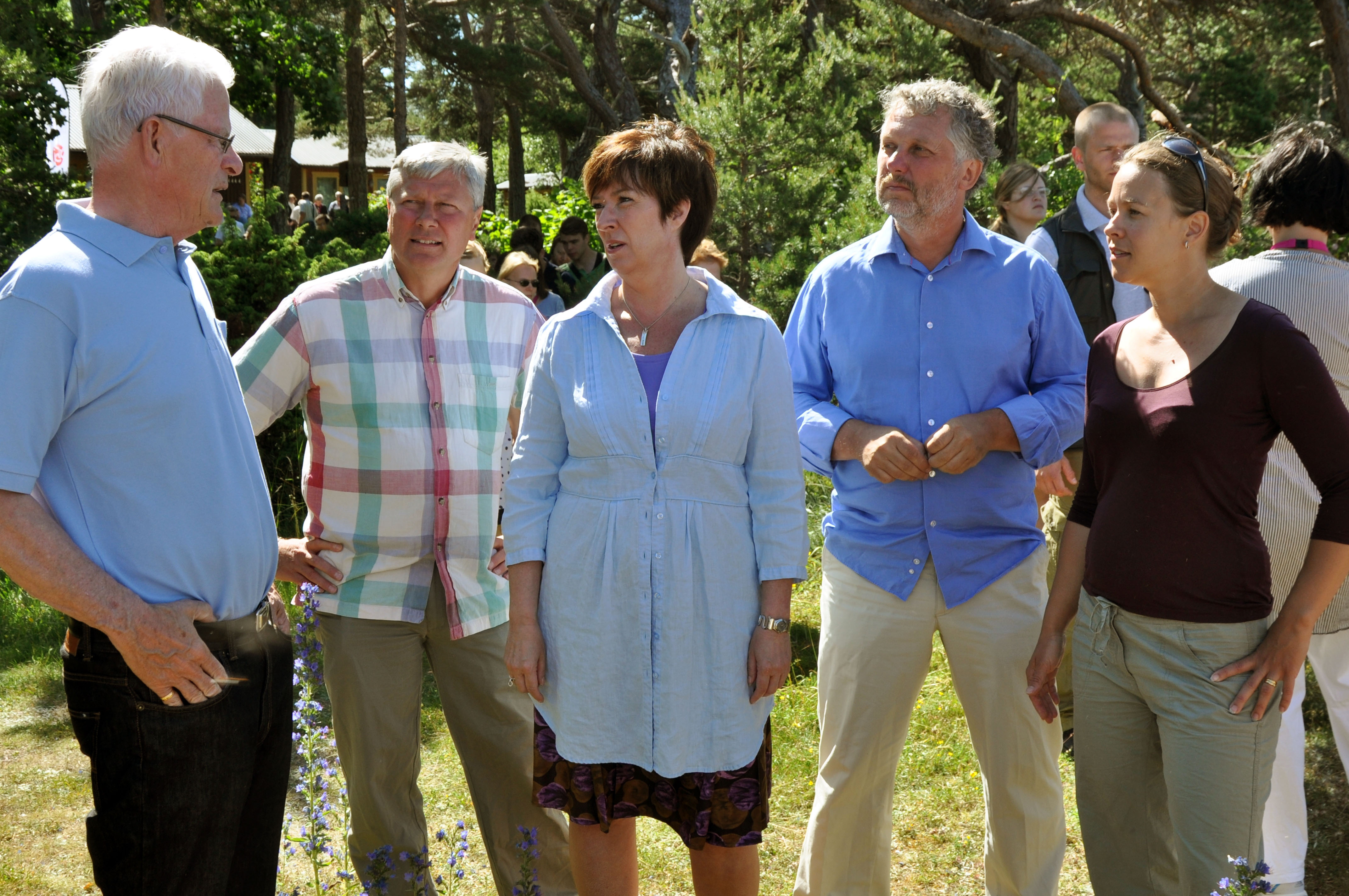 Rödgrön pressträff hos Ingvar Carlsson. Foto: Lena Dahlström